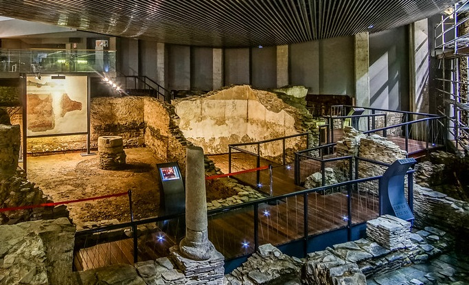 Este Museo, propiedad de la Universidad de Santiago de Compostela (USC) y del Ayuntamiento de Lugo y gestionado íntegramente por la Universidad, es un ejemplo excepcional de la historia urbana de la ciudad de Lugo. En un espacio de unos 700 m2 se agrupan diversos restos arqueológicos cuya interpretación permite conocer aspectos de grande interés acerca de la evolución de nuestra ciudad, tanto en el período romano como en épocas posteriores.